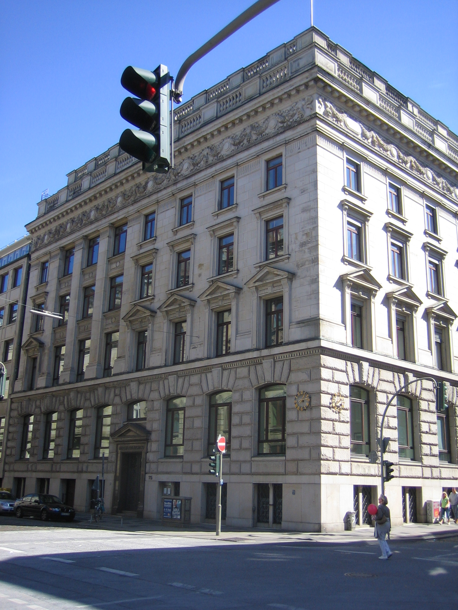 Hauptsitz des Bankhauses M.M.Warburg & CO KGaA in der Ferdinanstraße 75, 20095 Hamburg